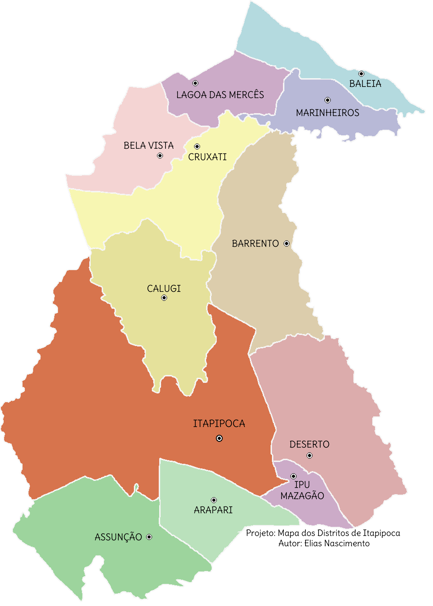 Mapa do município de Itapipoca dividido em distritos, com referência suas sedes.